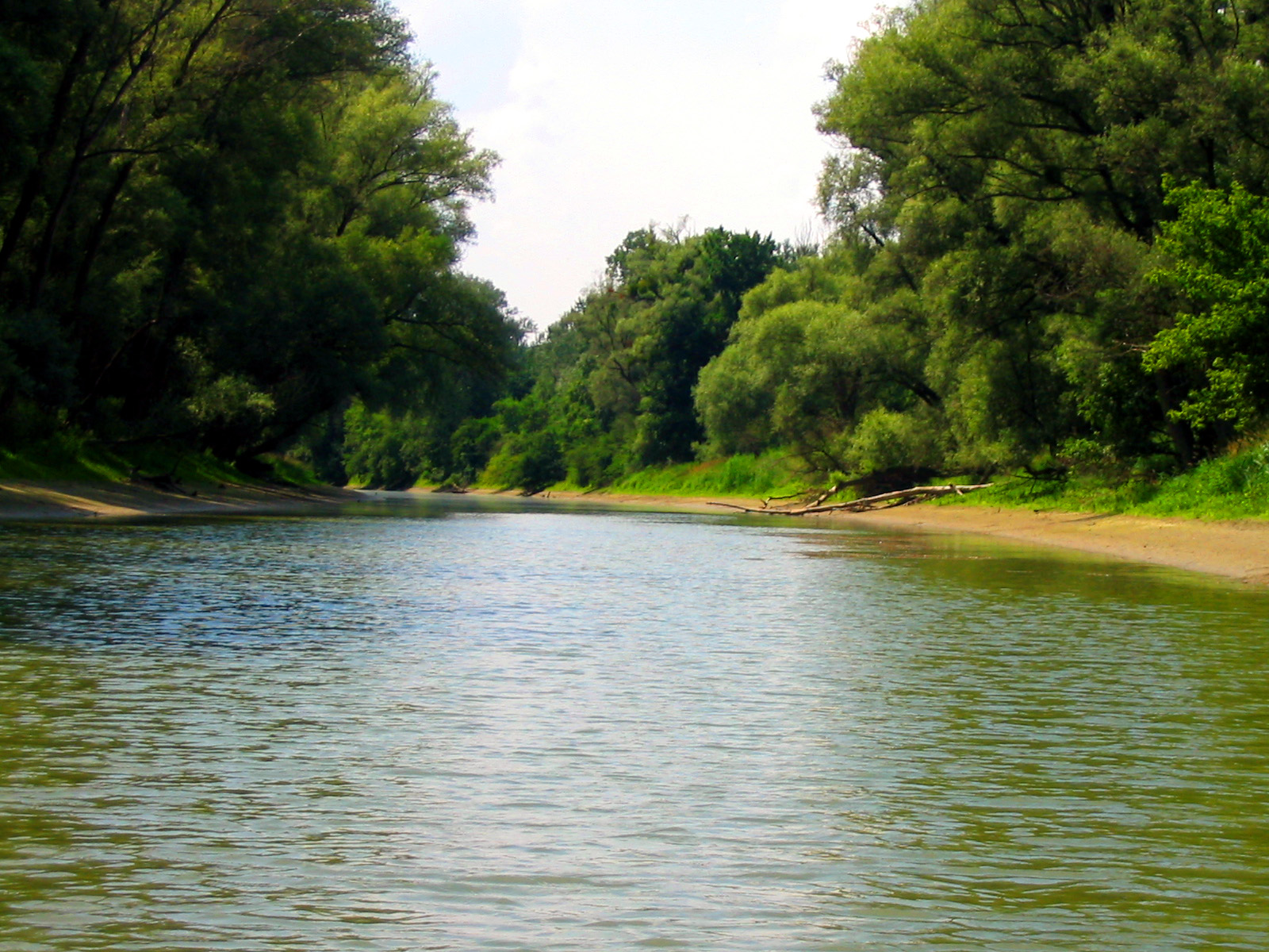 Donau-Auen bei Hainburg (Nachbearbeitung von [1])